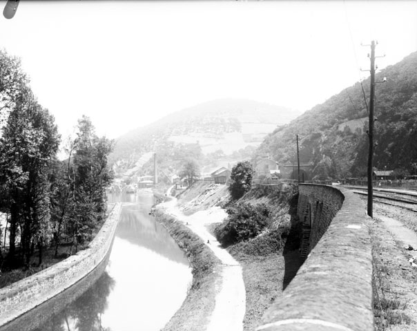 Fonds Trutat - Photographie ancienne Cote : TRU C 666 Localisation : Fonds ancien (S 30) Original non communicable Titre : Penchot : voie, Lot, gare, tunnel, 4 juin 1898 Auteur : Trutat, Eugène Rôle de l’auteur : Photographe Lieu de création : Penchot (Aveyron) Date de création : 1898 Mesures : : 9 x 12 cm Observations : Notes de E.Trutat : "obj. Goerz, pl. rouge 10' " Mot(s)-clé(s) : -- Usine -- Energie hydraulique -- Rivière -- Cours d'eau -- Rive -- Voie ferrée -- Gare -- Cheminée -- Colline -- Arbre -- Vallée -- Tunnel -- Eté -- Electricité -- Penchot (Aveyron) -- Boisse-Penchot (Aveyron) -- Decazeville (Aveyron) -- Midi-Pyrénées (France) -- Pyrénées (France) -- Lot, rivière (France) -- Decazeville (Aveyron ; canton) -- 19e siècle, 4e quart Médium : Photographies -- Négatifs sur plaque de verre -- Noir et blanc -- Goerz -- Paysages industriels -- Paysages Voir : TRU C 665 Penchot, usine hydraulique sur le Lot alimentant Bibliothèque de Toulouse. Domaine public